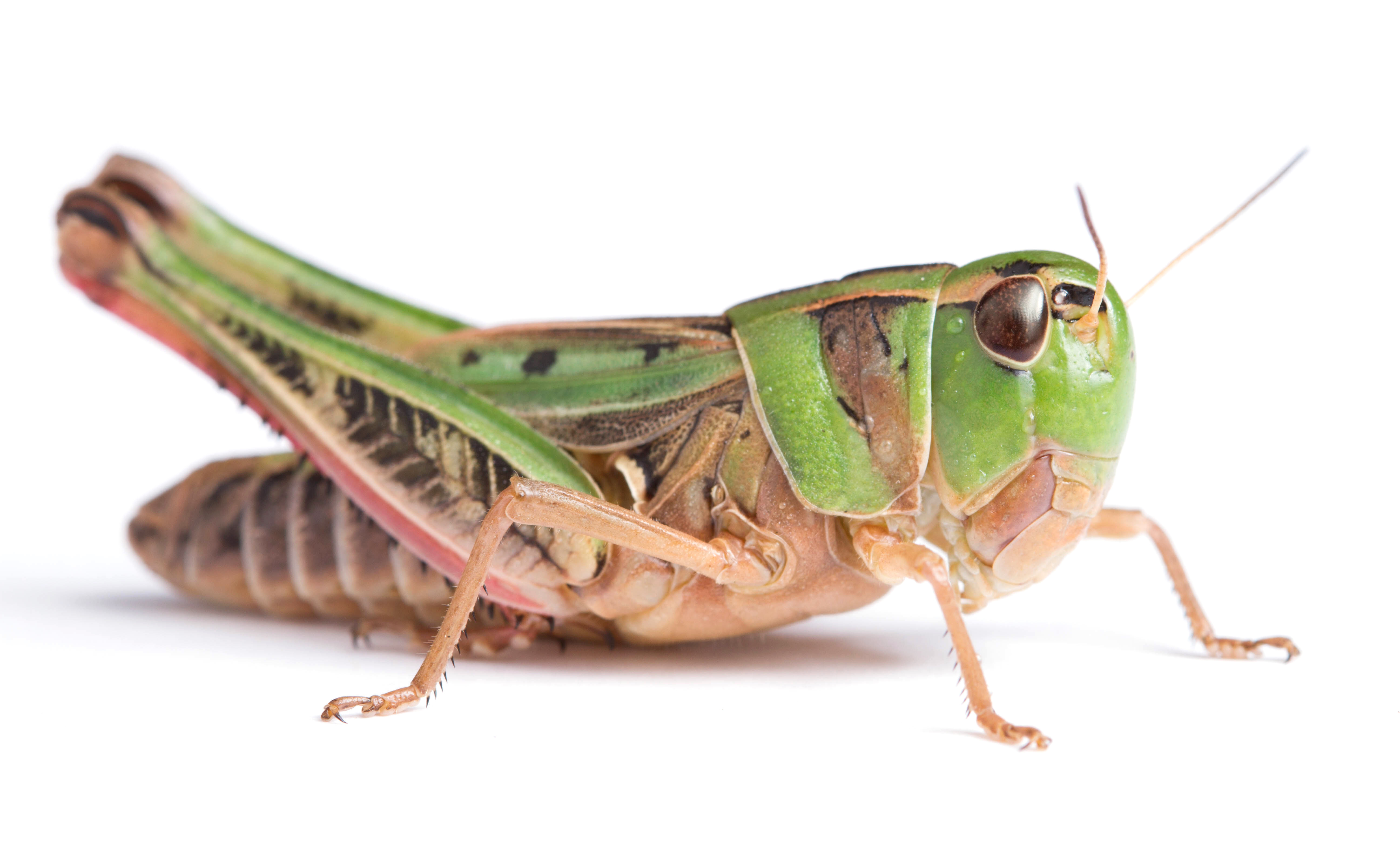 USA, TX, Gonzales Co. 24-v-2016